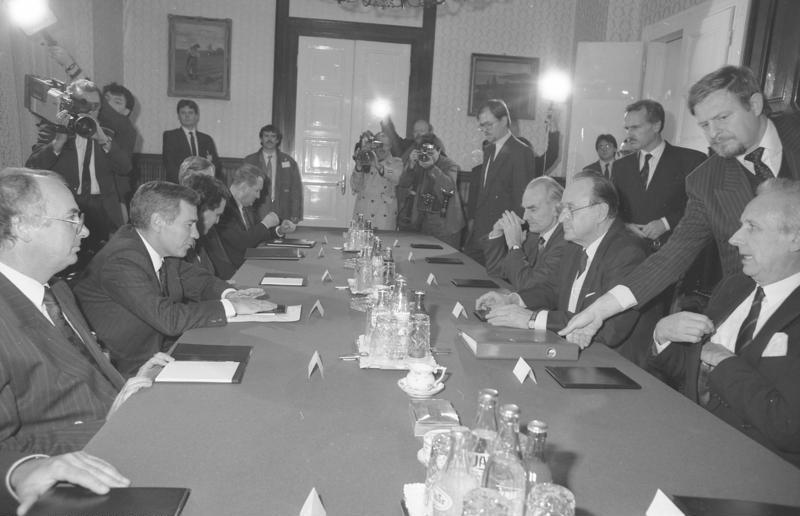 Bundesminister Genscher in Ungarn 23. - 24. November 1989